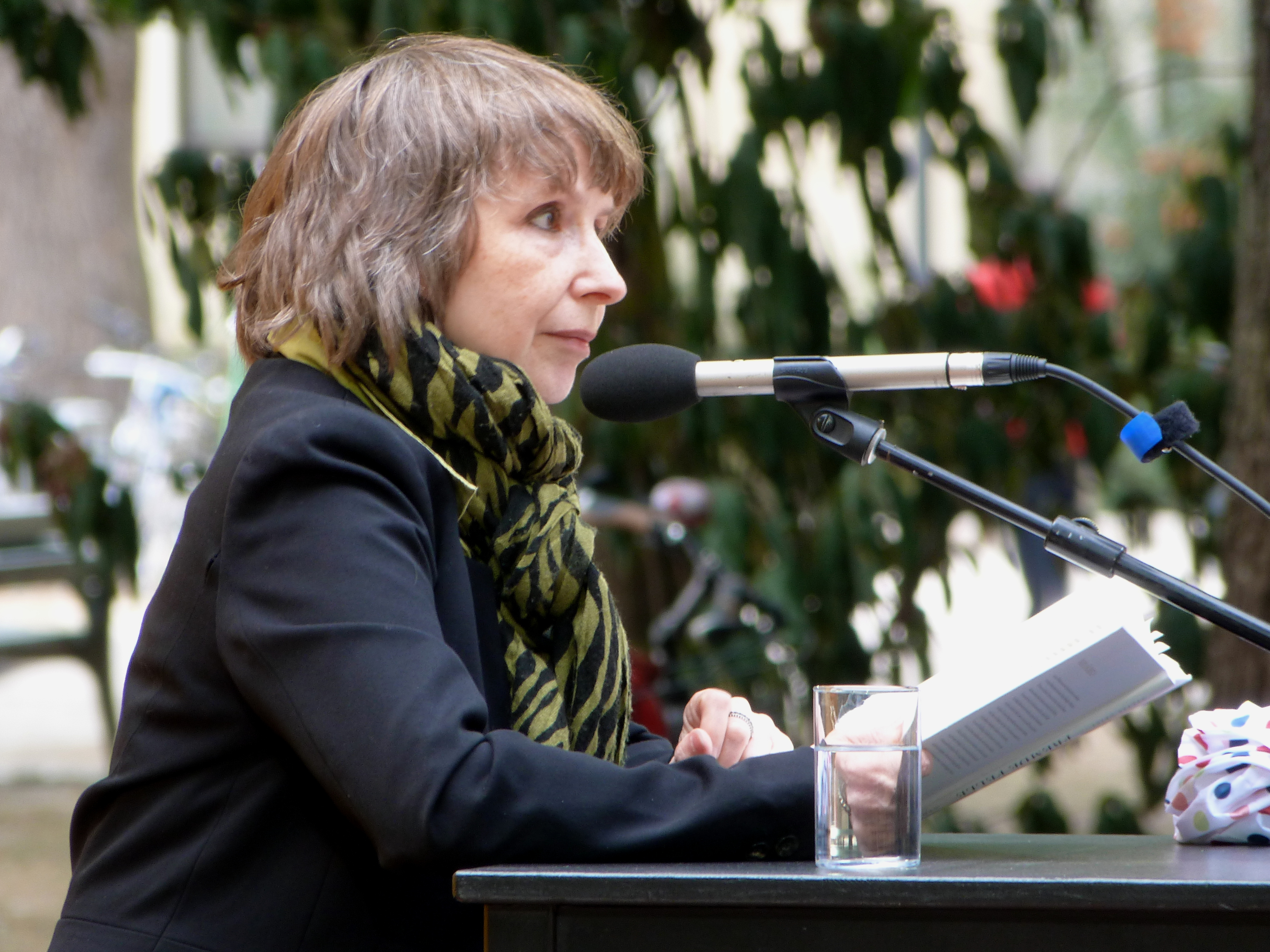 Die Schriftstellerin Sylvia Geist während einer Lesung auf dem Erlanger Poetenfest 2018.